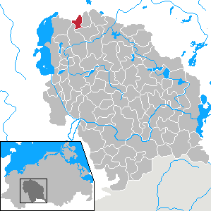 Langen Jarchow in Mecklenburg-Vorpommern - District Parchim